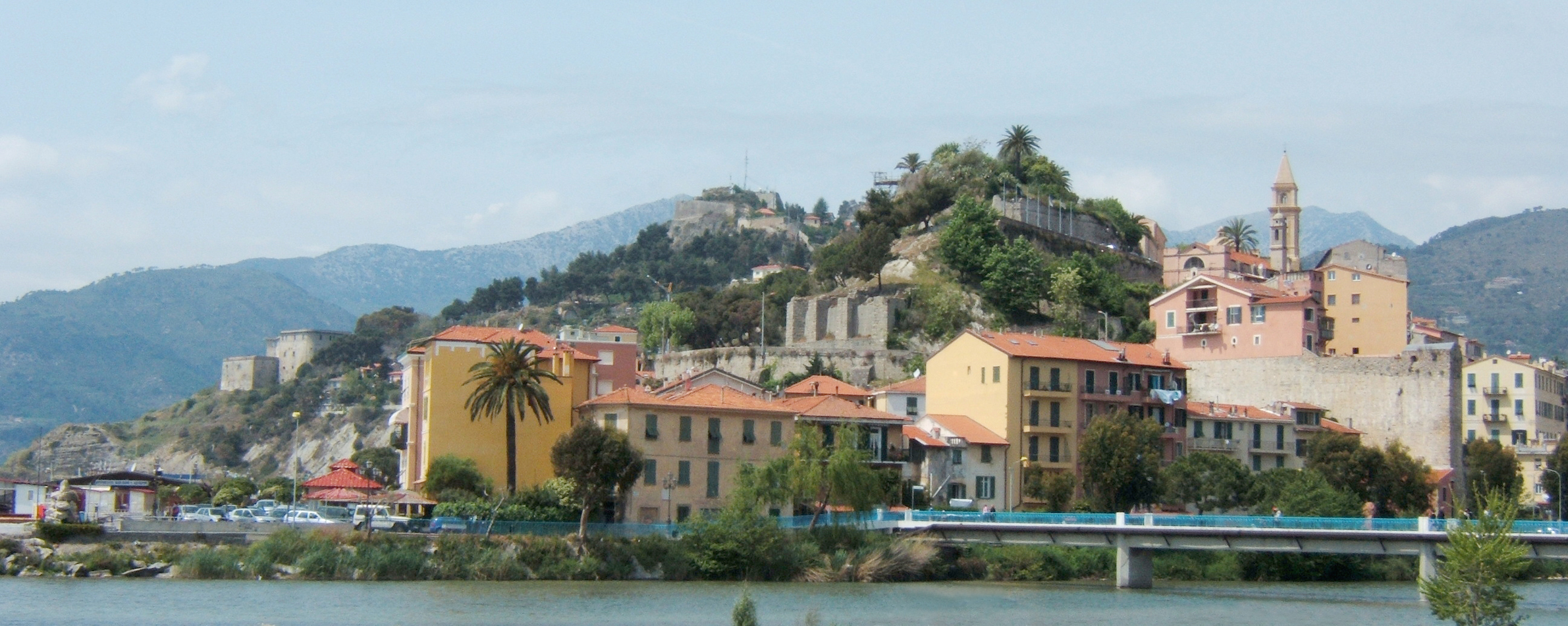 Vieux quartier de Ventimille se trouvant juste à l'ouest de l'embouchure du fleuve Roja. A droite de la photo, la passerelle Squarciafichi et la porta Marina. A gauche, la forteresse Fortezza dell'Annunziata.